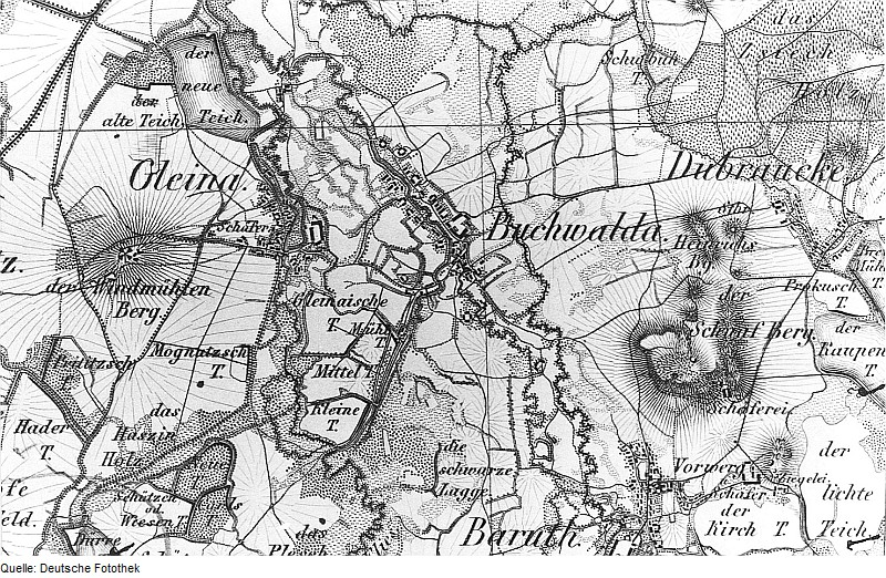 Original image description from the Deutsche Fotothek Malschwitz-Buchwalde. Oberreit, Sect. Bautzen, 1844/46